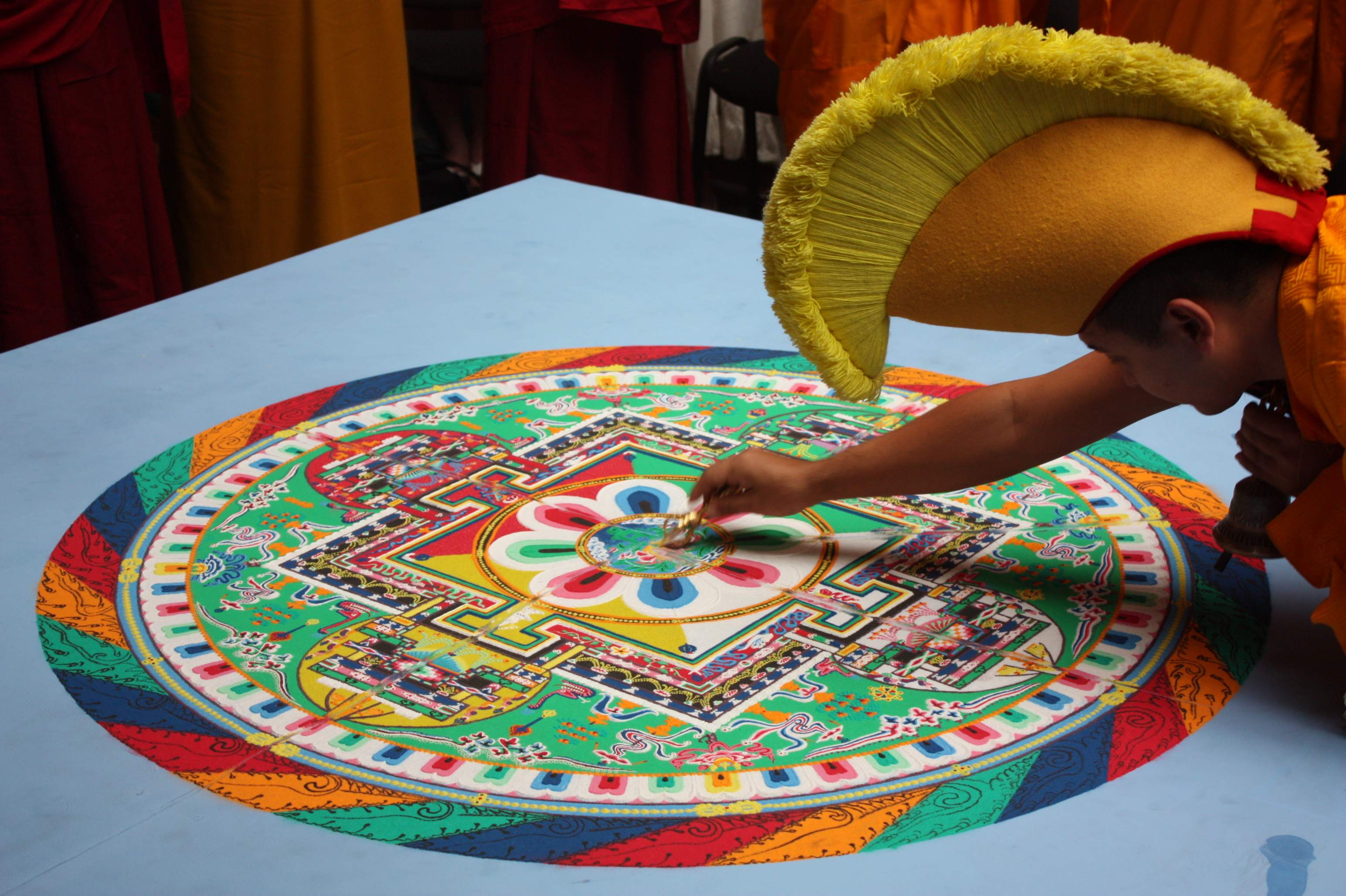 "Разрезание" мандалы Зеленой Тары на мероприятии "Дни Тибета в Москве", 24 июня 2011